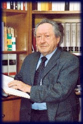 Foto di Camillo Brero.